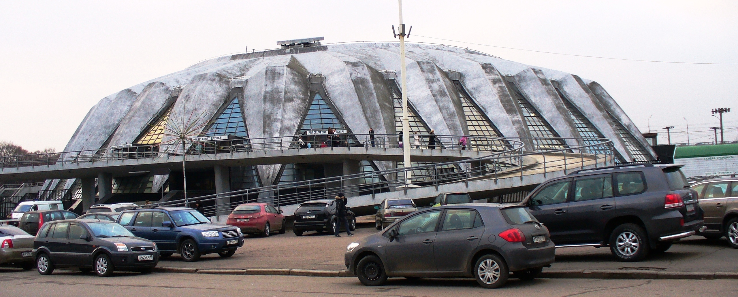 Универсальный спортзал "Дружба" спортивного комплекса Лужники